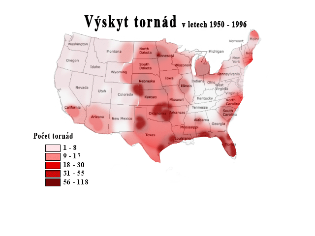 Graf četnosti výskytu tornád